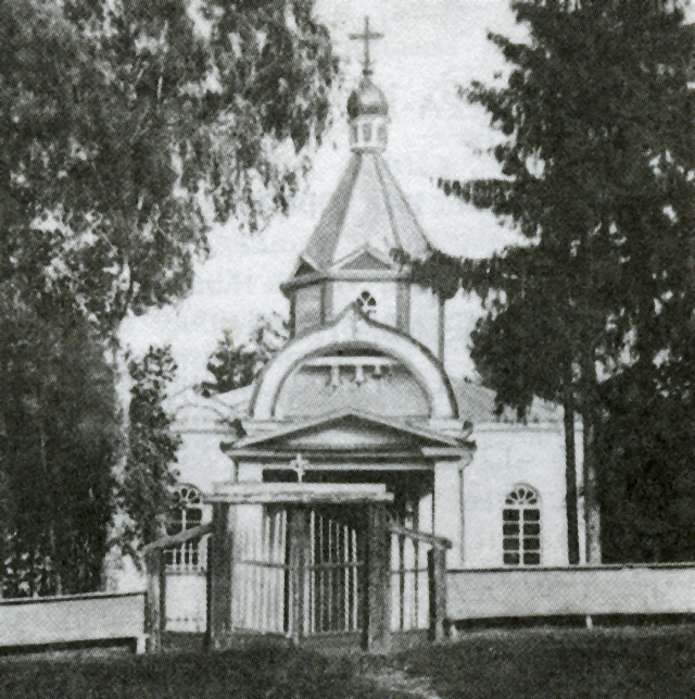 Беларуская (тарашкевіца): Царква ў в. Прылукі. Фота Яна Балзункевіча пачатку 20 ст.